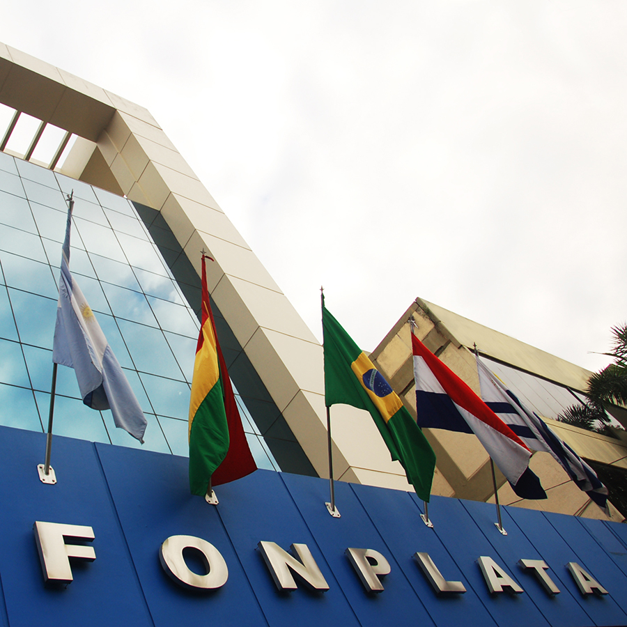 Edificio de Fonplata 2015